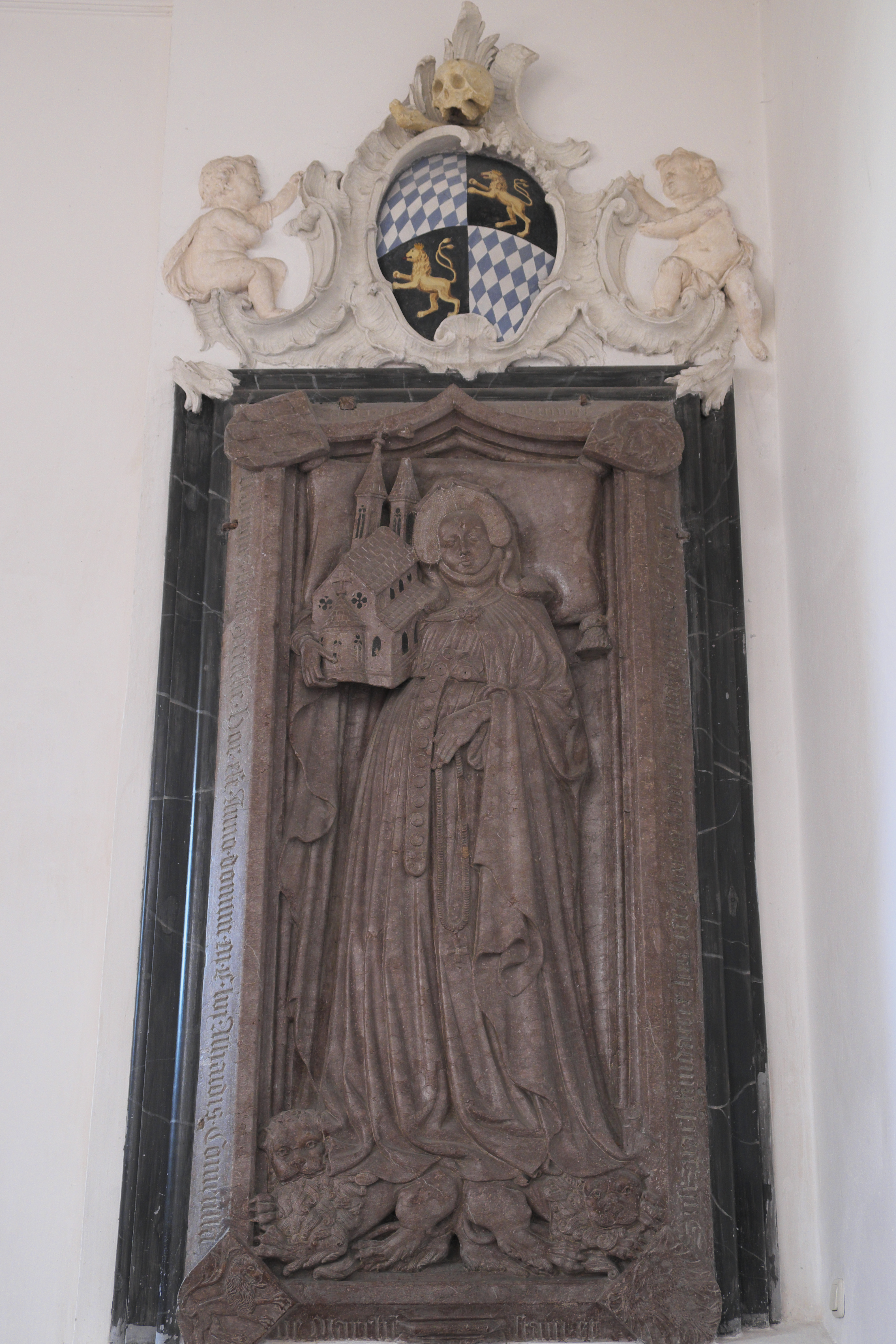 Ehemalige Augustiner-Chorherrenstiftskirche St. Margaretha in Baumburg an der Alz, einem Ortsteil von Altenmarkt an der Alz im Landkreis Traunstein (Bayern/Deutschland), Grabmal der Stifterin Adelheid von Frontenhausen